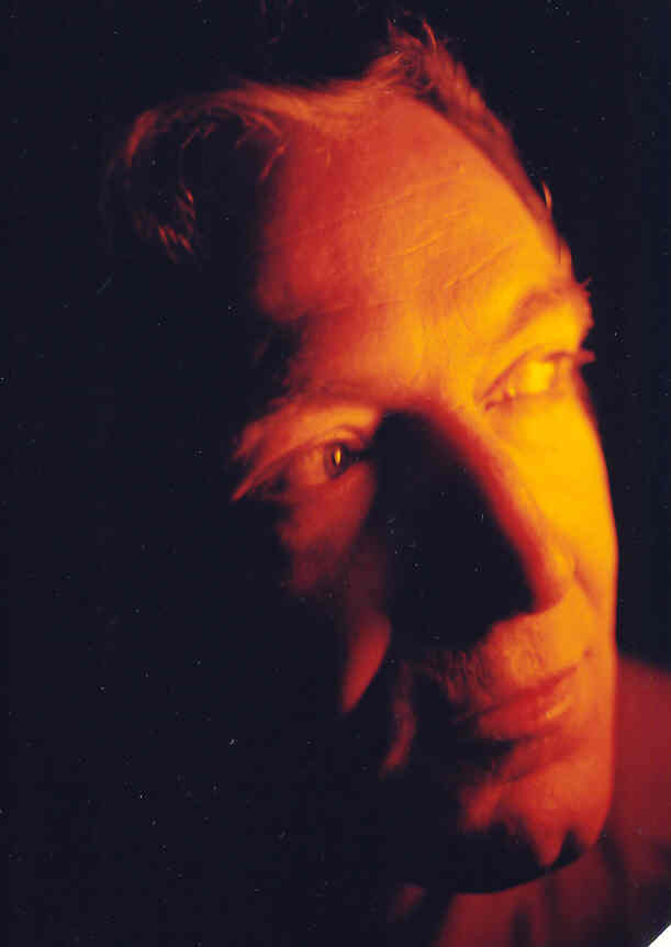 alfonso Montero uno de sus últimos retratos.